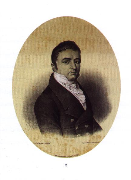 Manuel José García Ferreyra. Litografía de Edmoond _Desmadryl